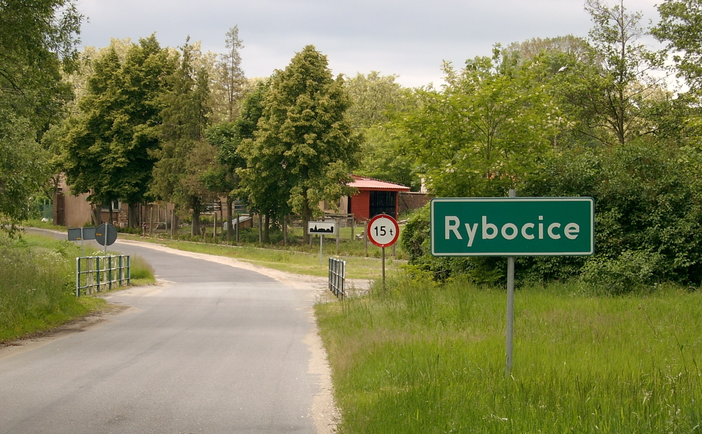 Rybocice Ortseingang von Süden